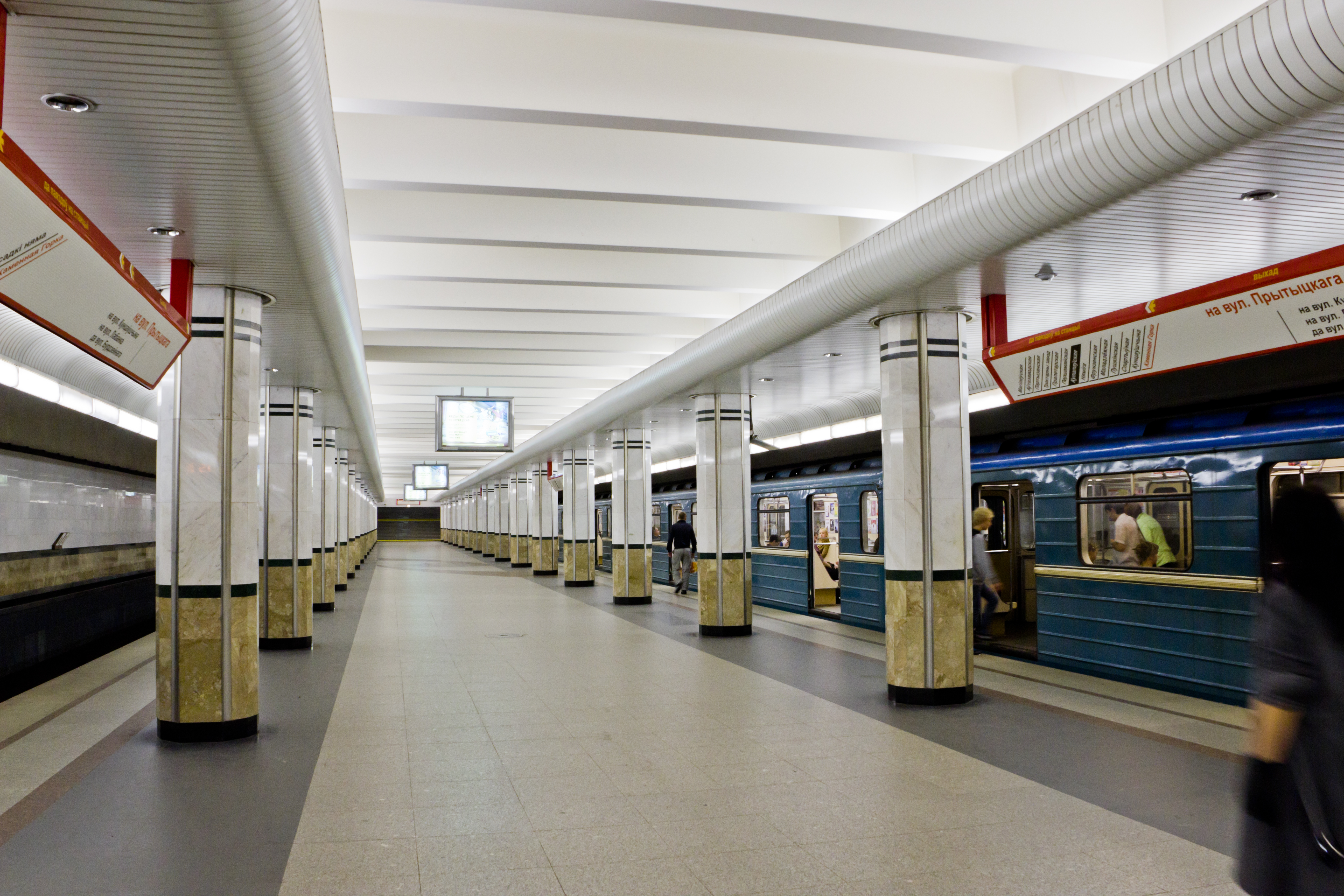 Станция метро «Каменная Горка», Минск